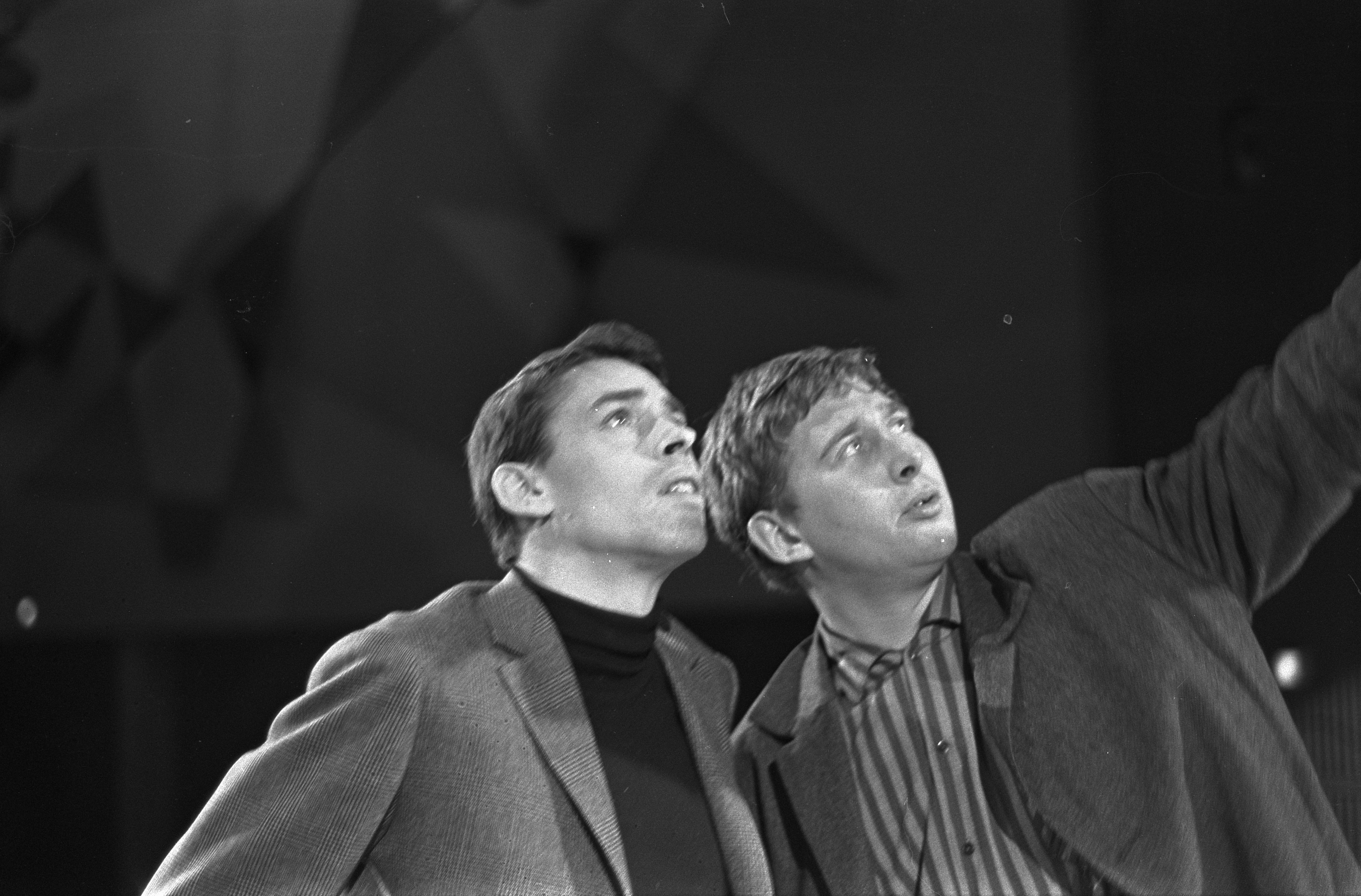 Collectie / Archief : Fotocollectie Anefo Reportage / Serie : [ onbekend ] Beschrijving : TV-uitzending "Domino" Jacques Brel (links) tijdens de opname in Amsterdam, Marcanti Datum : 20 februari 1963 Locatie : Amsterdam, Noord-Holland Trefwoorden : TV-programma's, zangers Persoonsnaam : Brel, Jacques Fotograaf : Bilsen, Joop van / Anefo Auteursrechthebbende : Nationaal Archief Materiaalsoort : Negatief (zwart/wit) Nummer archiefinventaris : bekijk toegang 2.24.01.05 Bestanddeelnummer : 914-8397